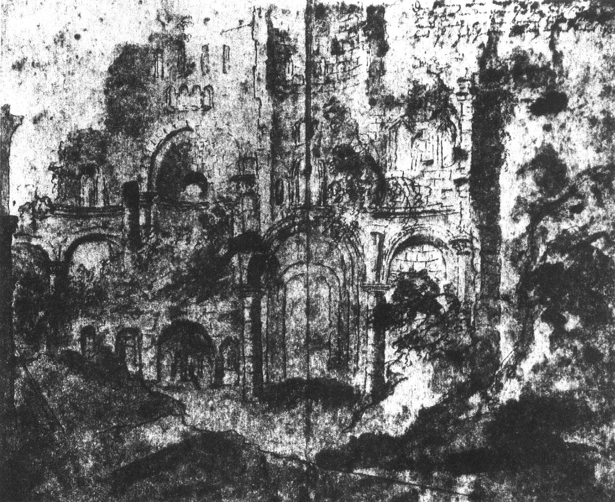 Heilig-Grab-Kirche Speyer, Zeichnung von 1733. Die Kirche war nach dem Dom der bedeutendste romanische Sakralbau in Speyer.